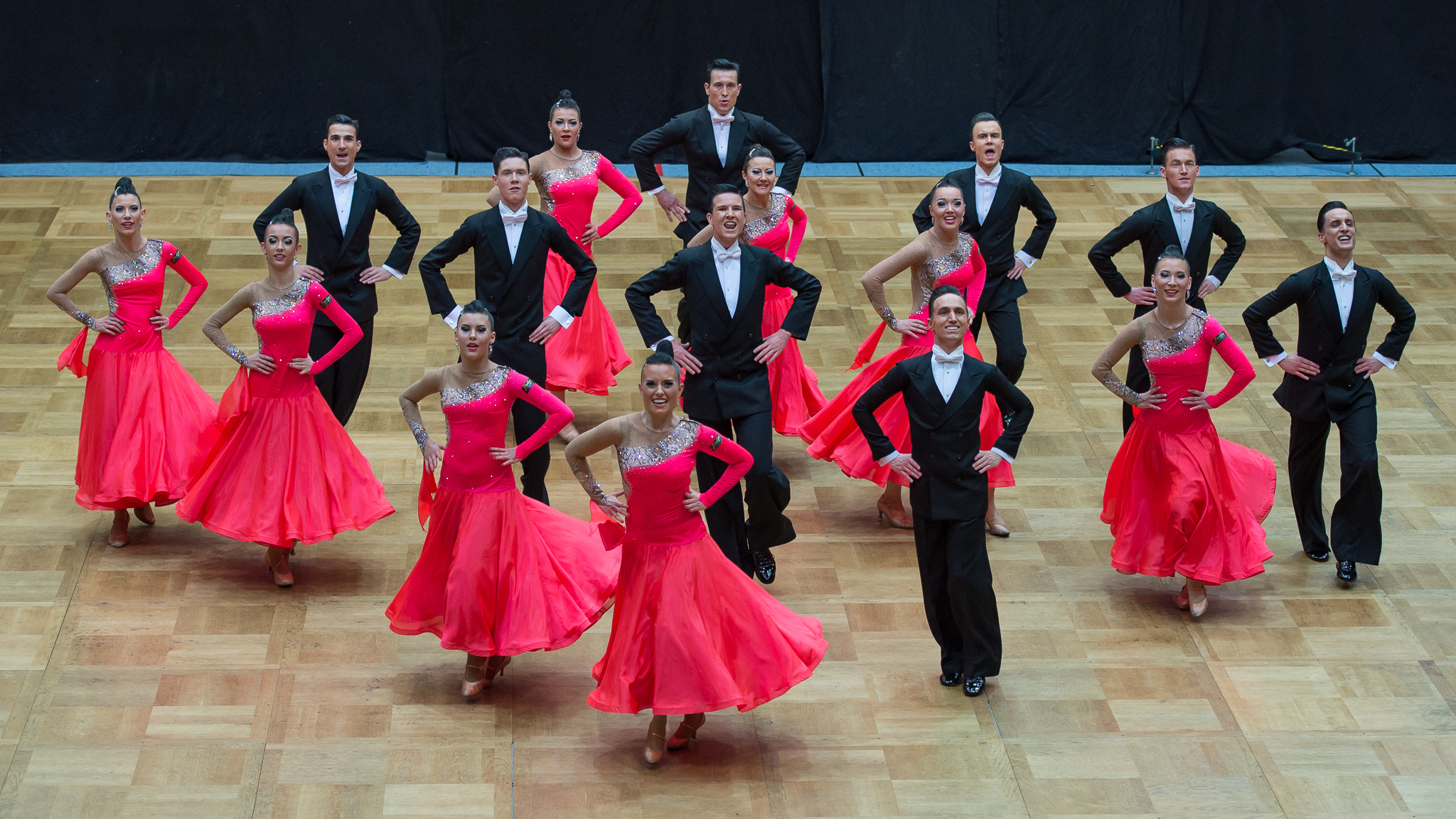 1. Bundesliga Standard Formation,Formationstanz,Sporthalle am Berliner Platz,TSC Rot-Gold-Casino Nürnberg,Tanzsport